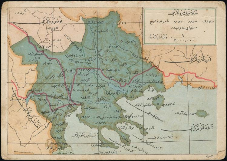 Солунски вилает